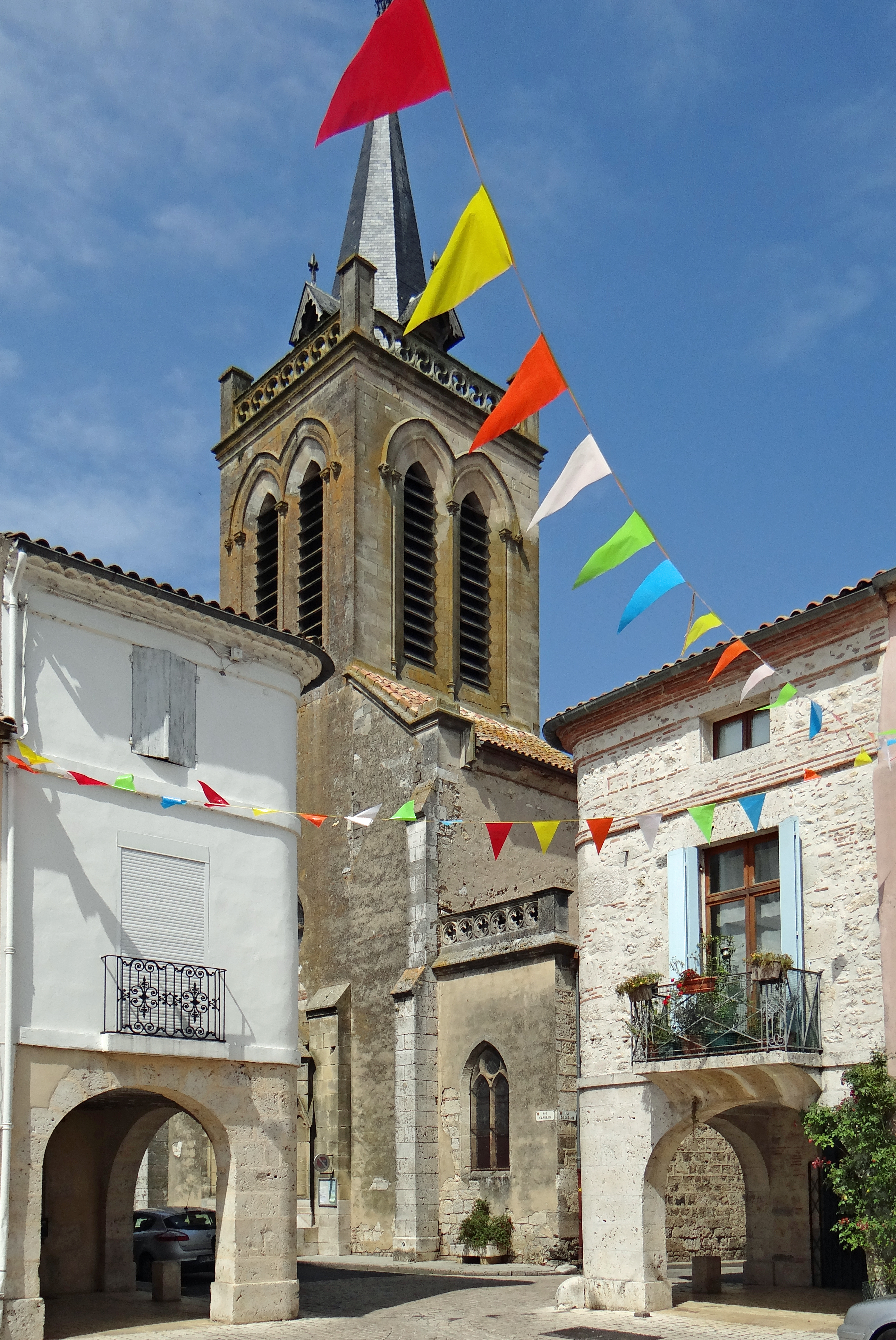 Damazan - Église Notre-Dame vue depuis la place Armand-Fallières